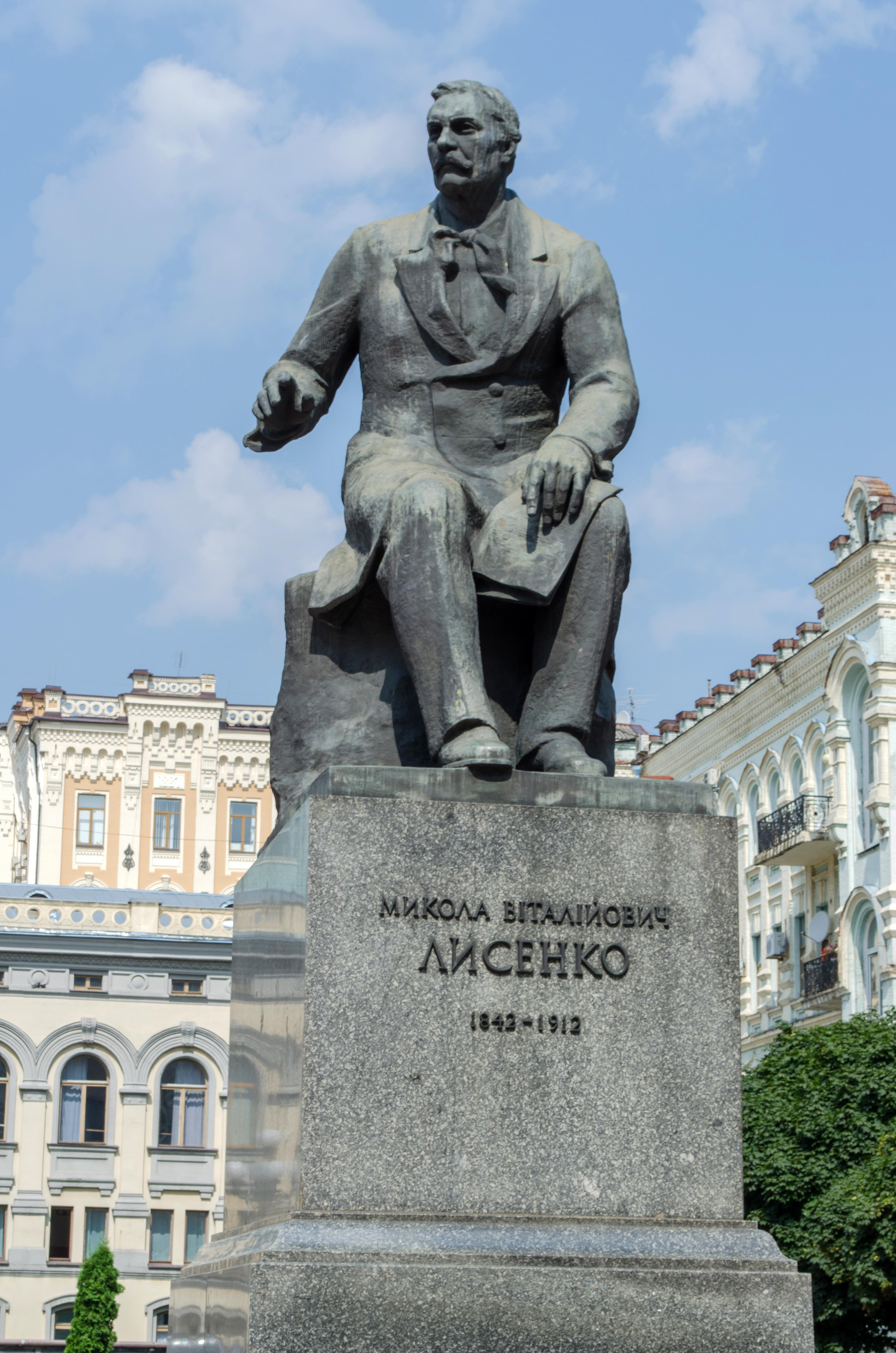 Пам'ятник Лисенку М. В., українському композитору, Київ, Театральна пл.